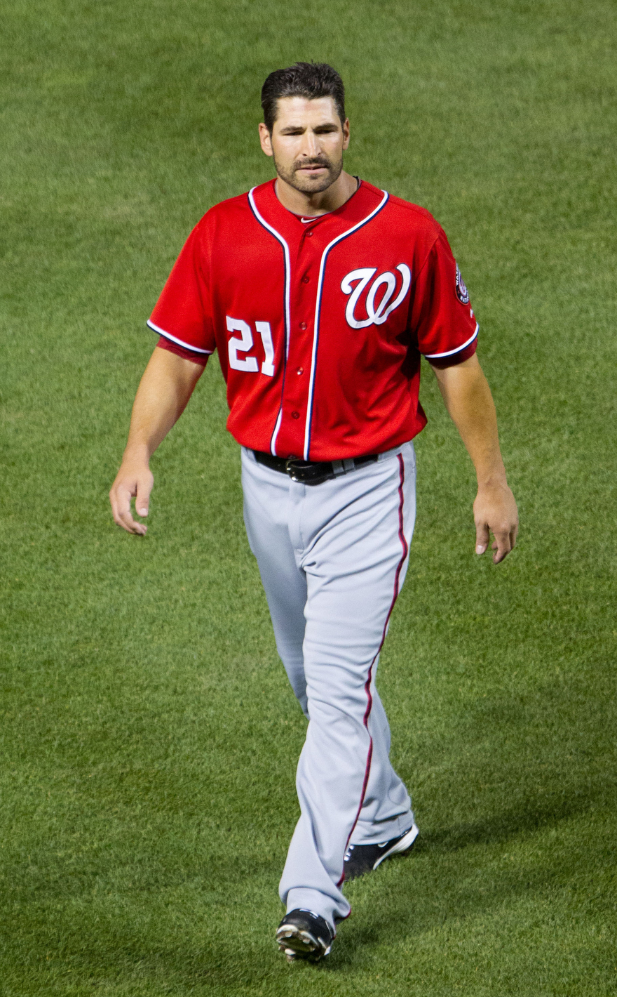 Xavier Nady